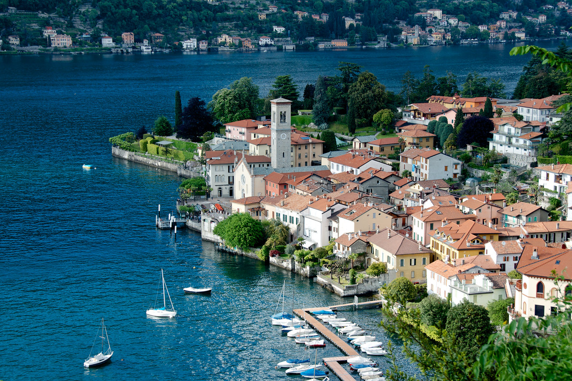 Vista del paese di Torno, in provincia di Como, affacciato sul lago di Como.